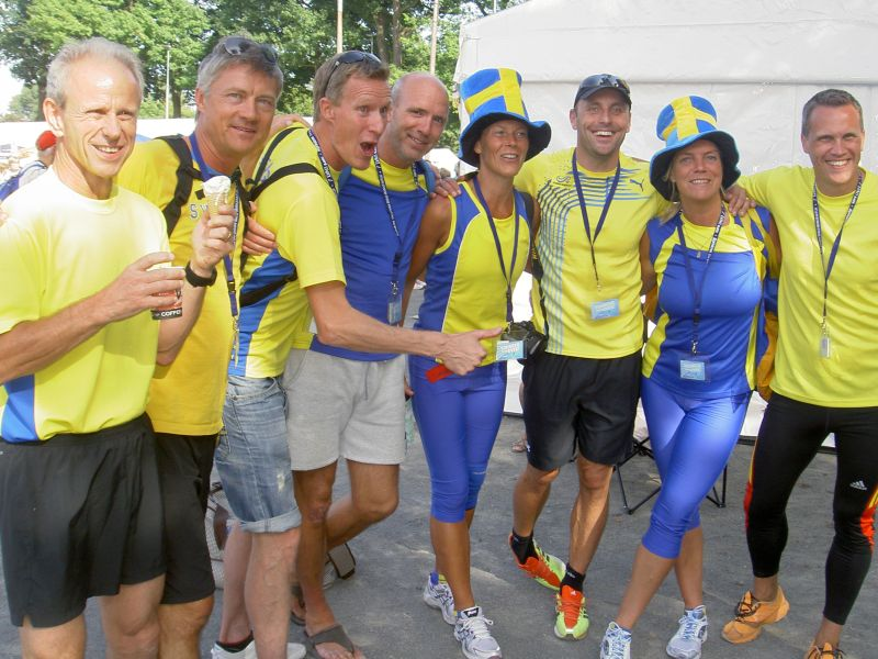 Svenska veteranfriidrottare med bland annat Mattias Sunneborn i Zittau, Tyskland, EM 2012